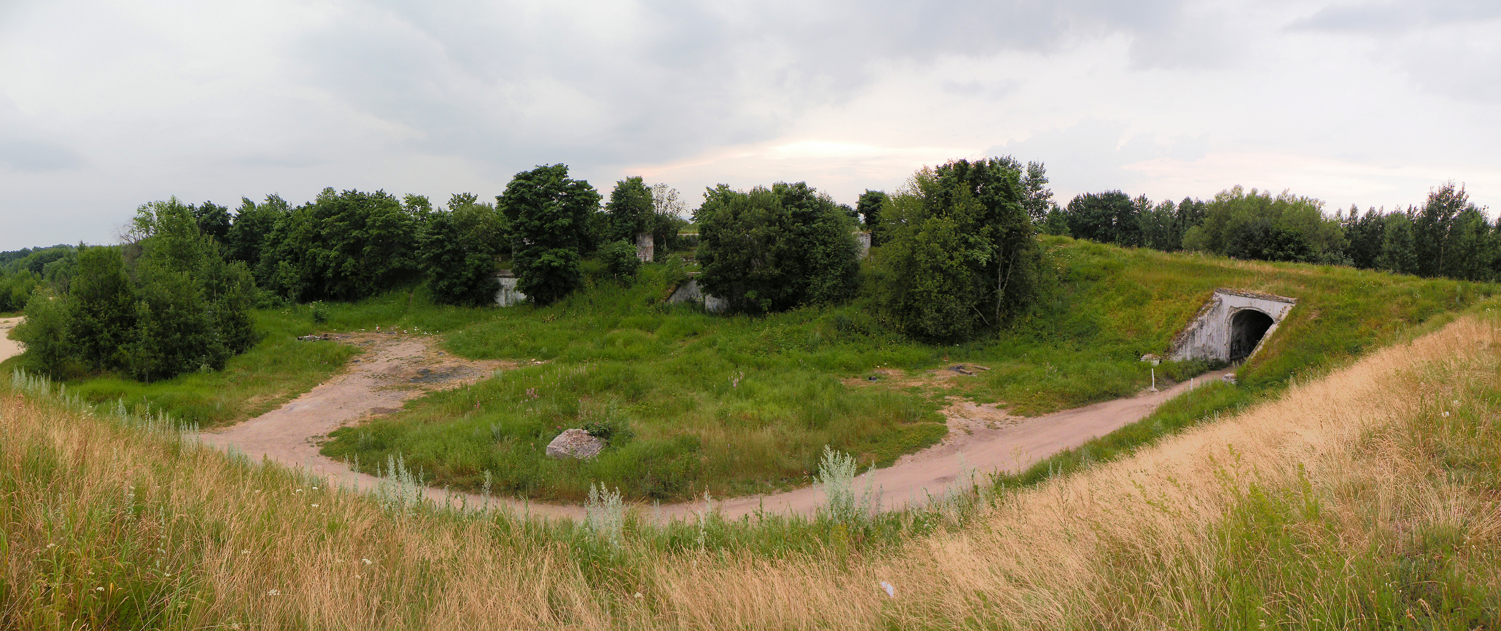 Кронштадт.Форт Шанц.